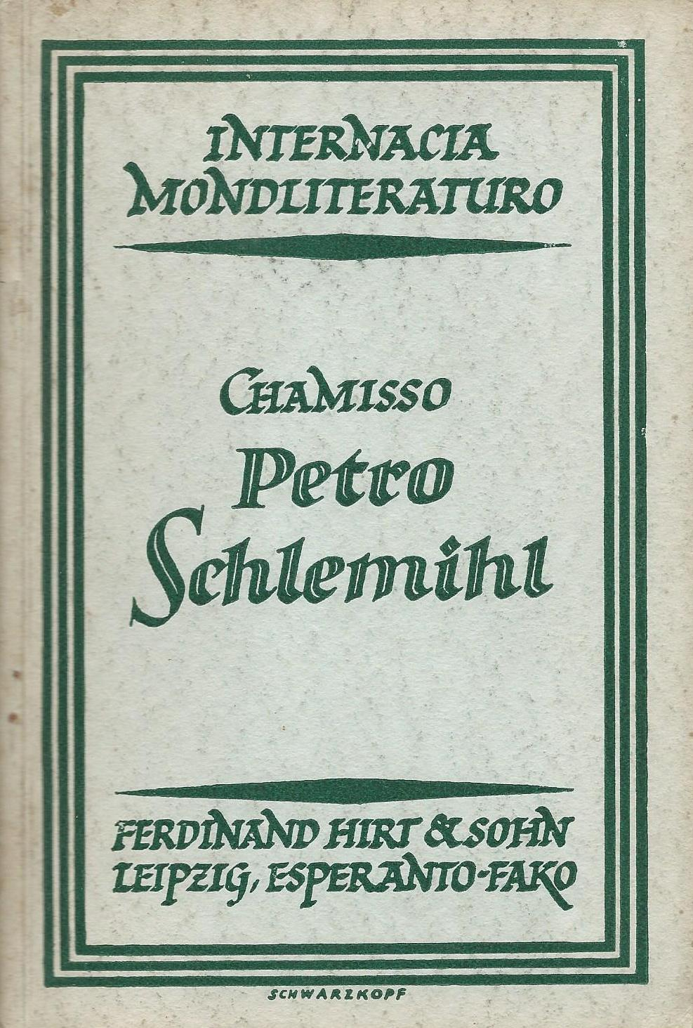 kovrilo de "La Mirinda Historio de Petro Schlemihl", 1922